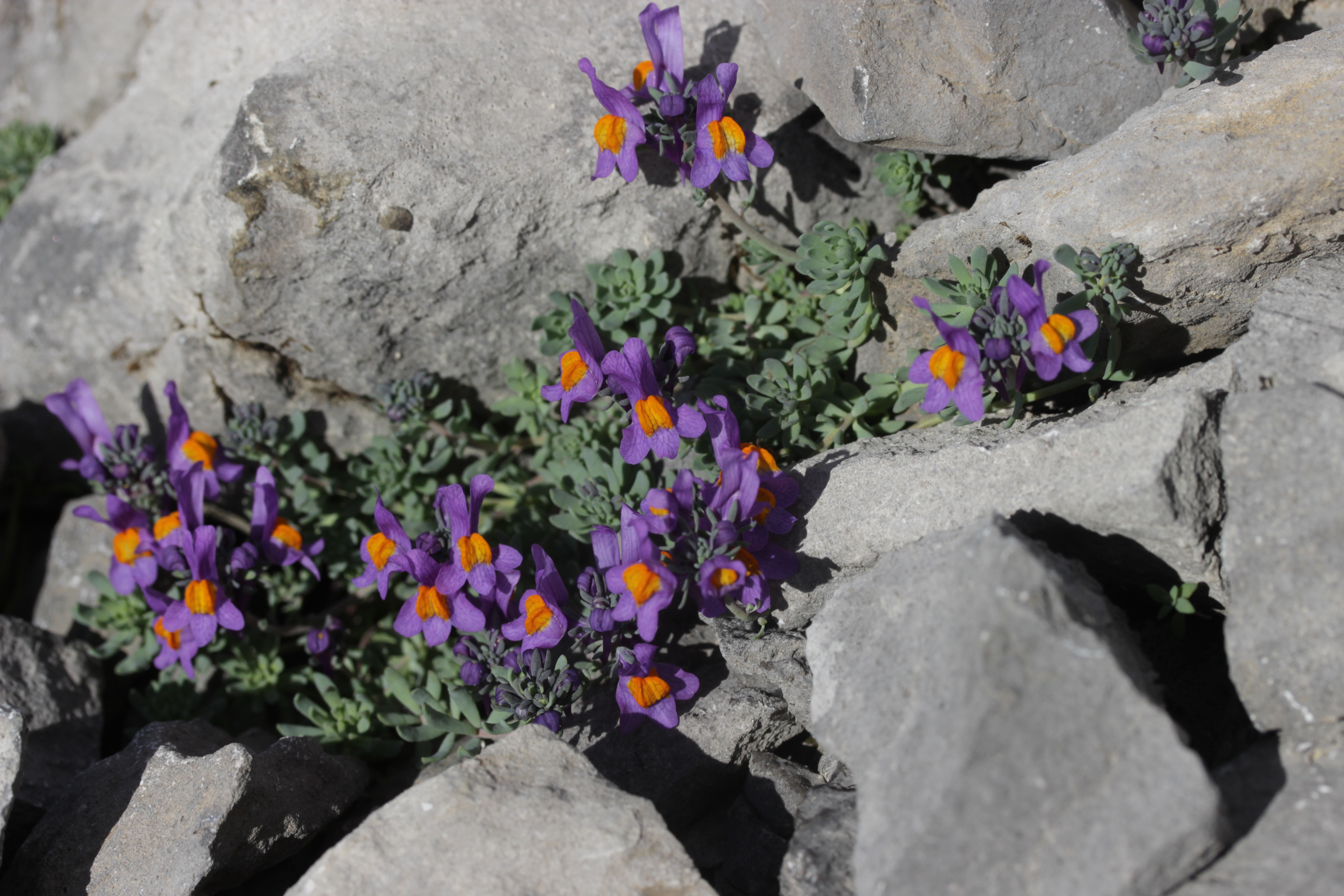 Alpine Toadflax - Linaria alpina